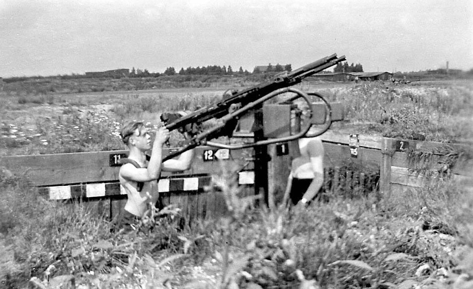 2-cm-Zwillingsflak Flugzeug-Bordkanone auf Lafette MG FF cannon